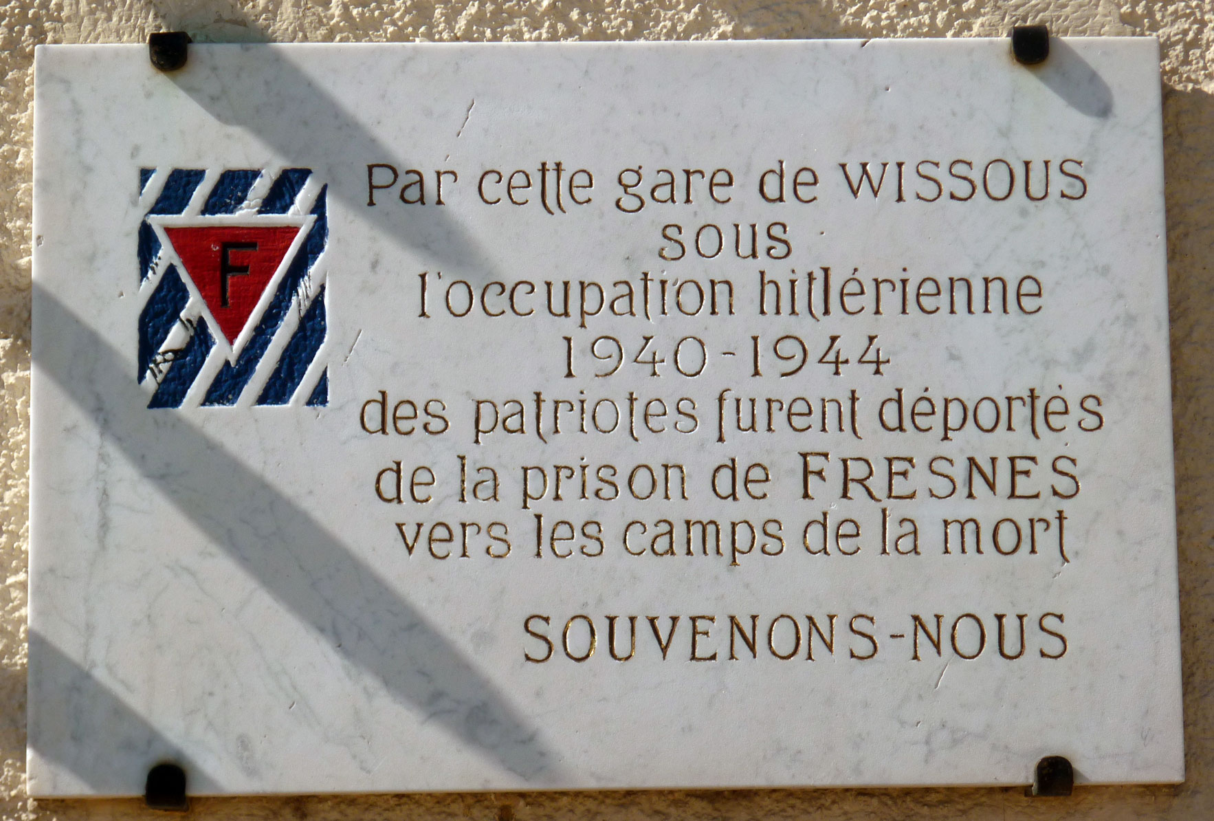 Plaque commémorative à la gare de Wissous